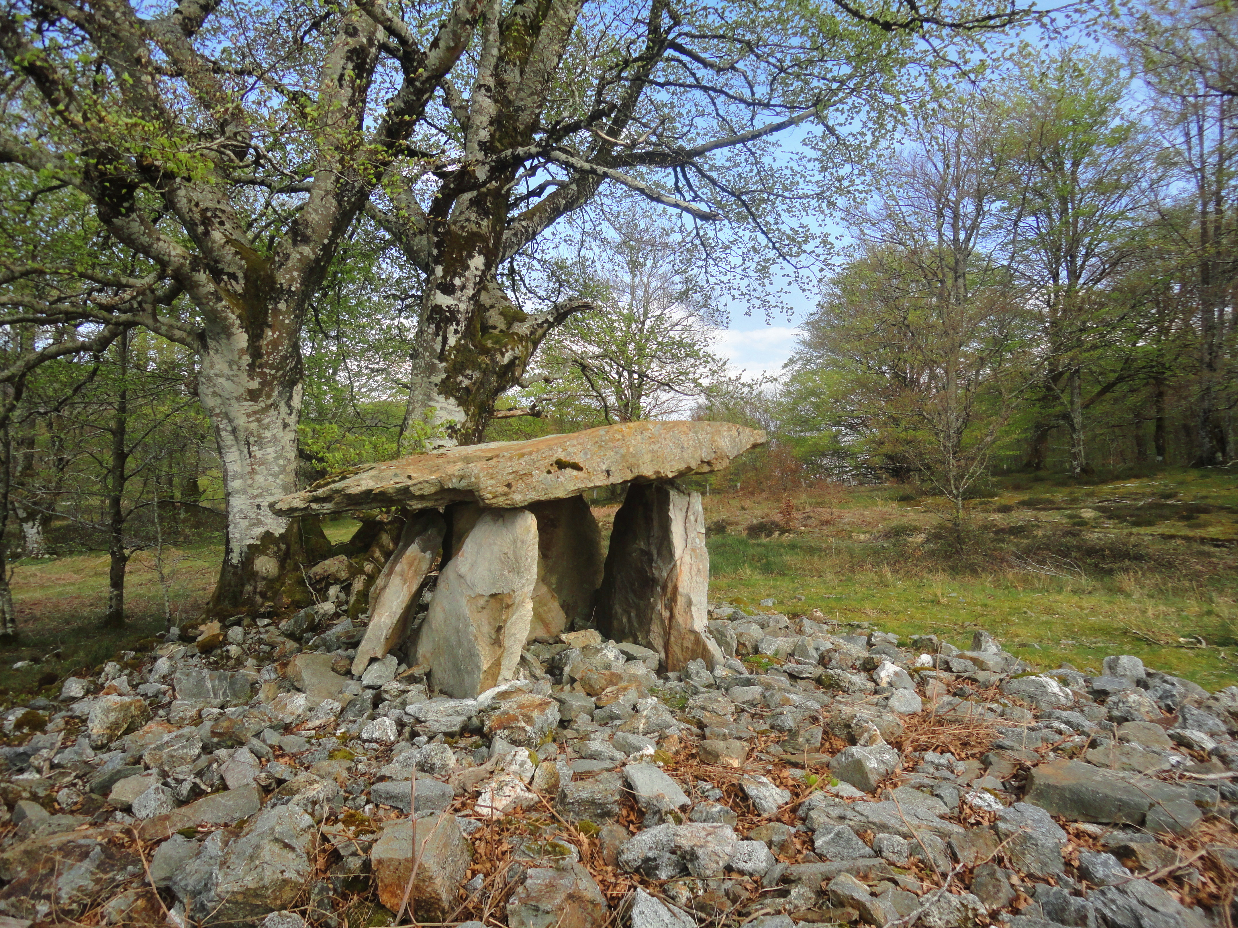 Azango Miaka trikuharria - Saldias